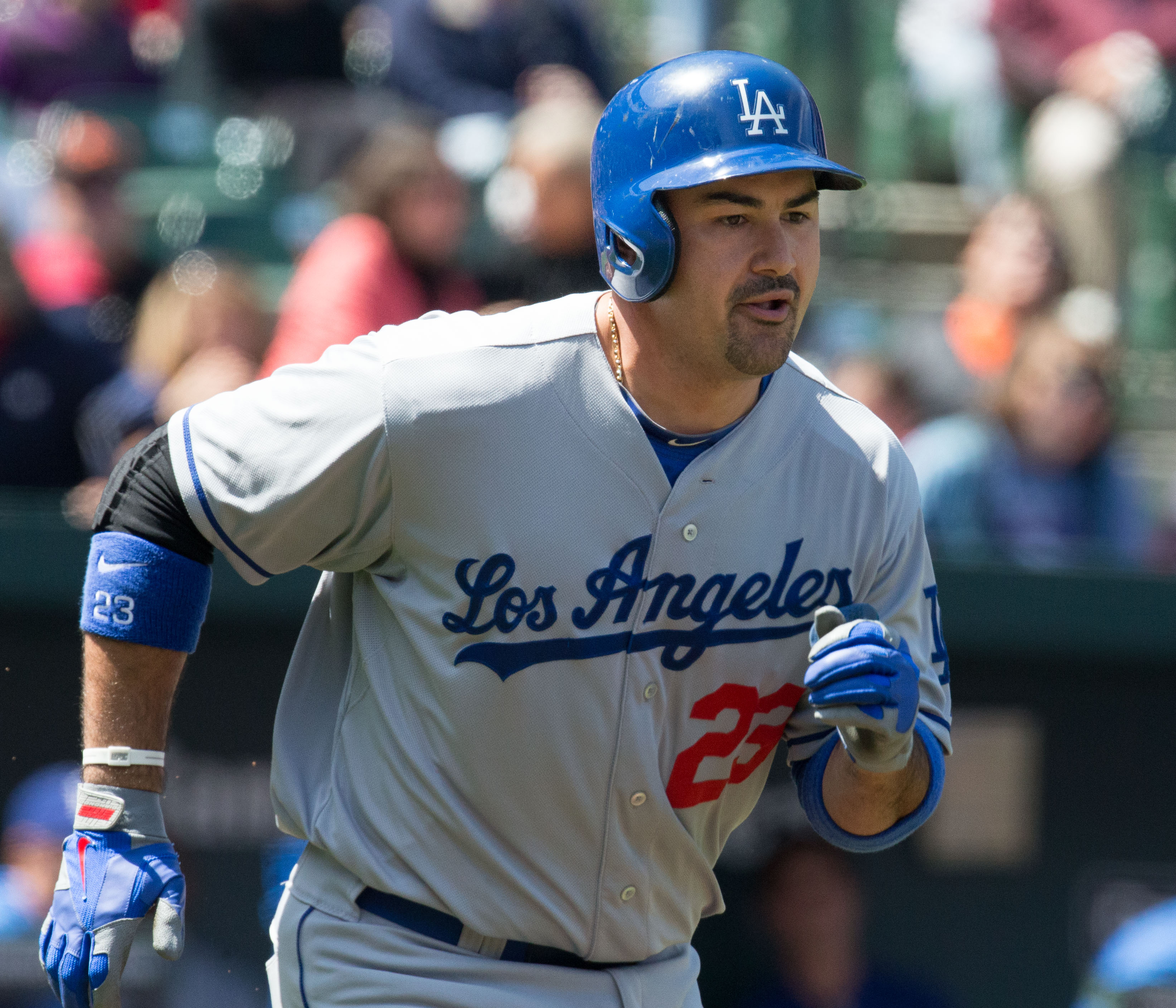 Adrian Gonzalez